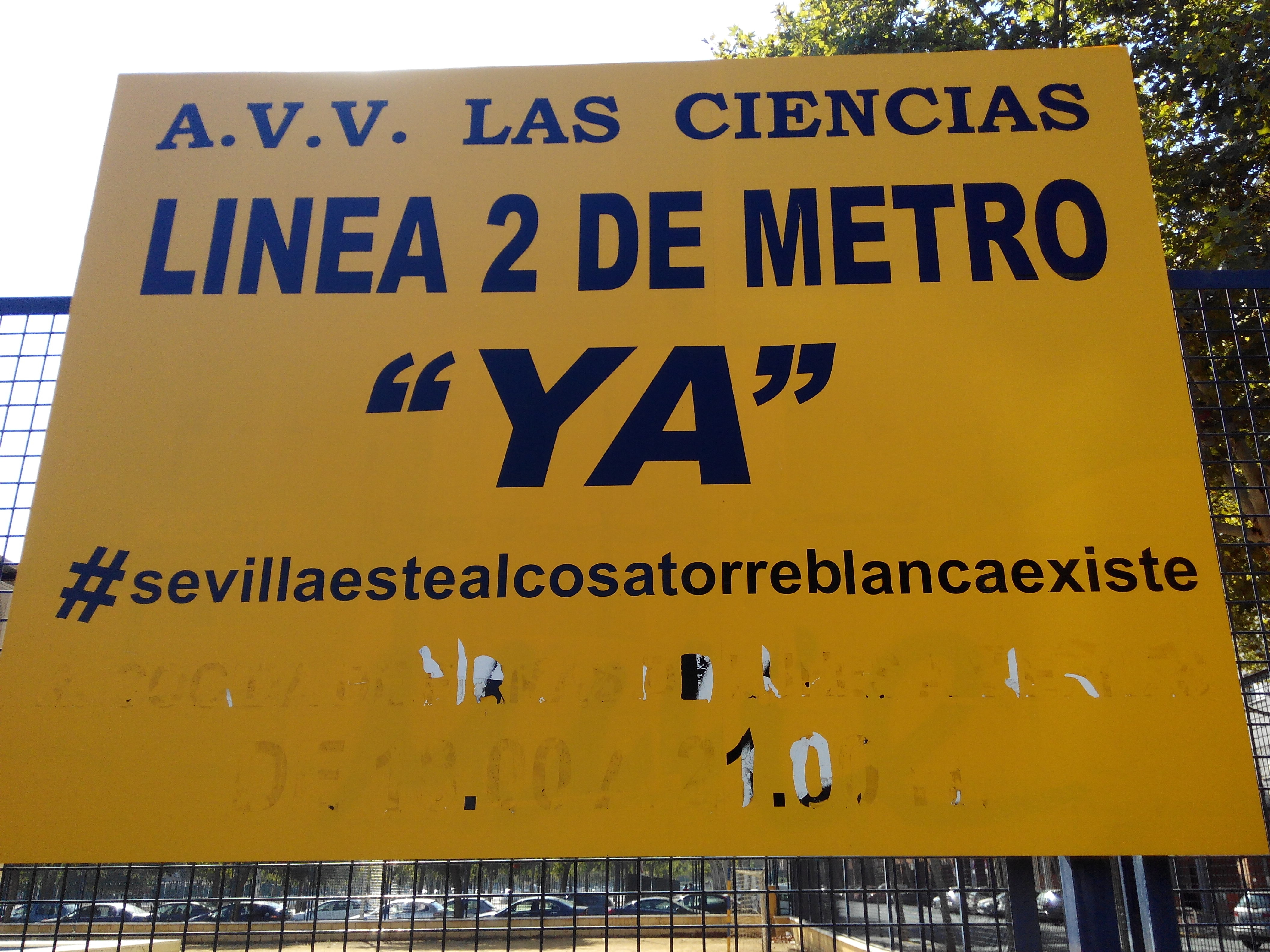 Cartel callejero reivindicado la construcción del metro en un barrio de Sevilla.